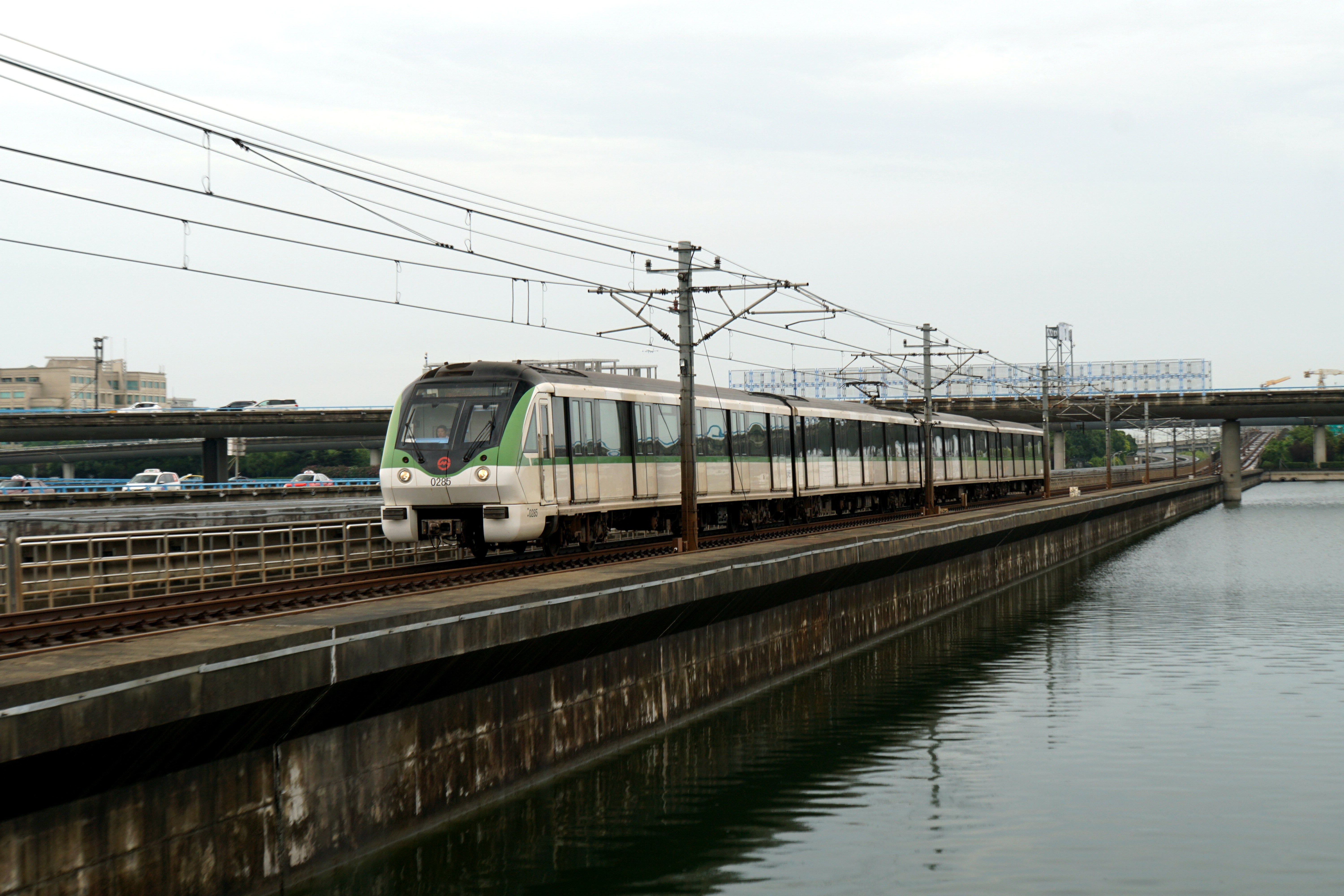 2号线列车正在接近浦东国际机场站